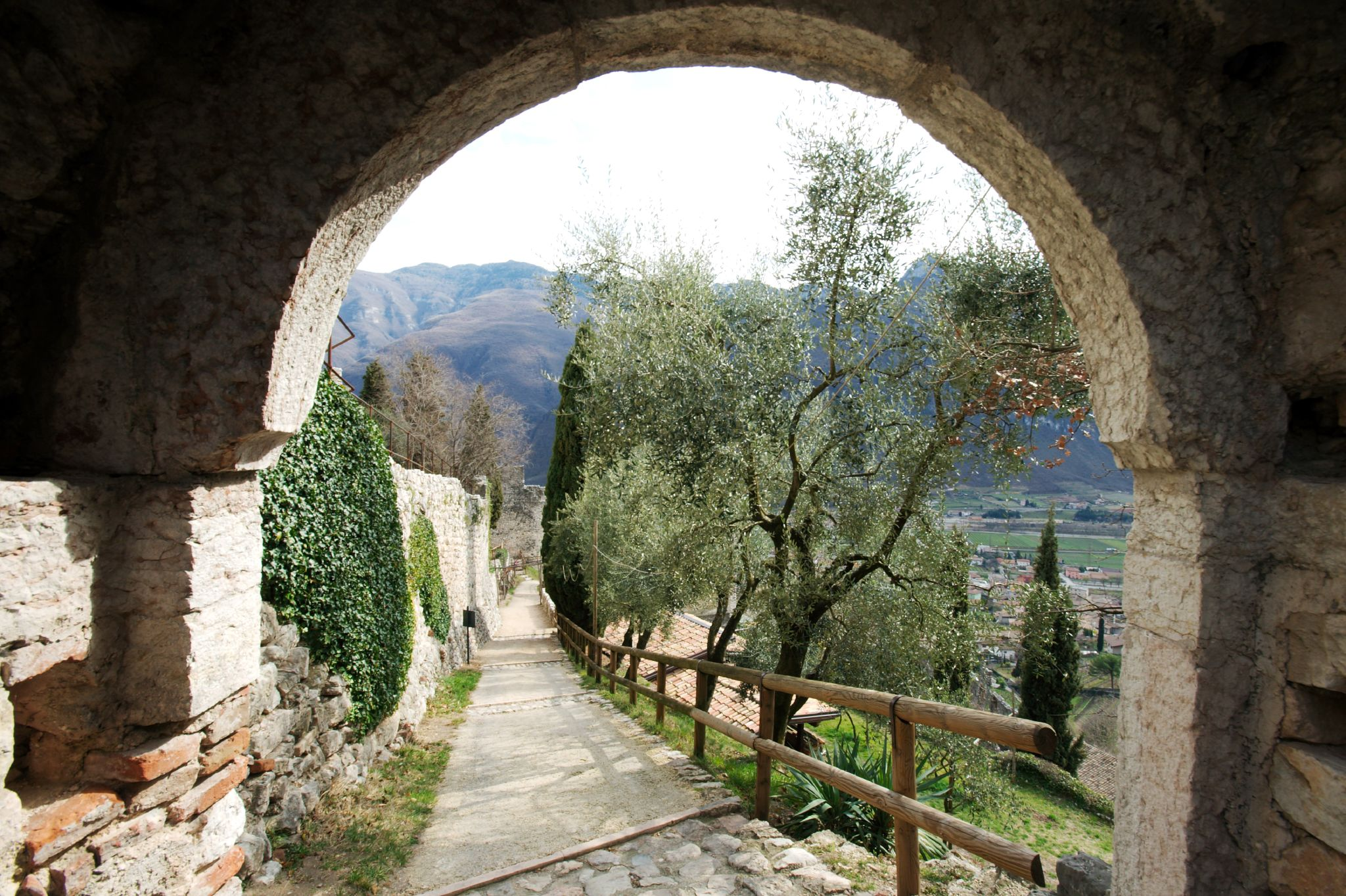 Il castello di avio. Avio, Trentino-Alto Adige. – Una foto dall'arco che mette in comunicazione la parte alta con i giardini situati nella zona bassa. ("gli uliveti interni")